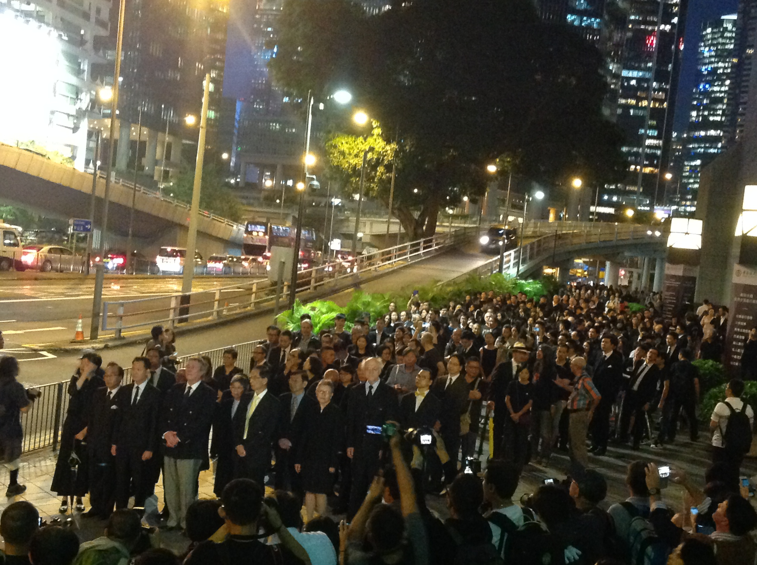 香港法律界举行反人大释法黑衣静默游行（美国之音海彦拍摄） 香港法律界近日对人大常委会就基本法第104条有关宣誓条例的释法反应强烈。继香港大律师公会星期二发表声明表示不满之后，法律界11月8日下午发起静默黑衣游行，抗议人大释法冲击香港司法制度，为香港立法。